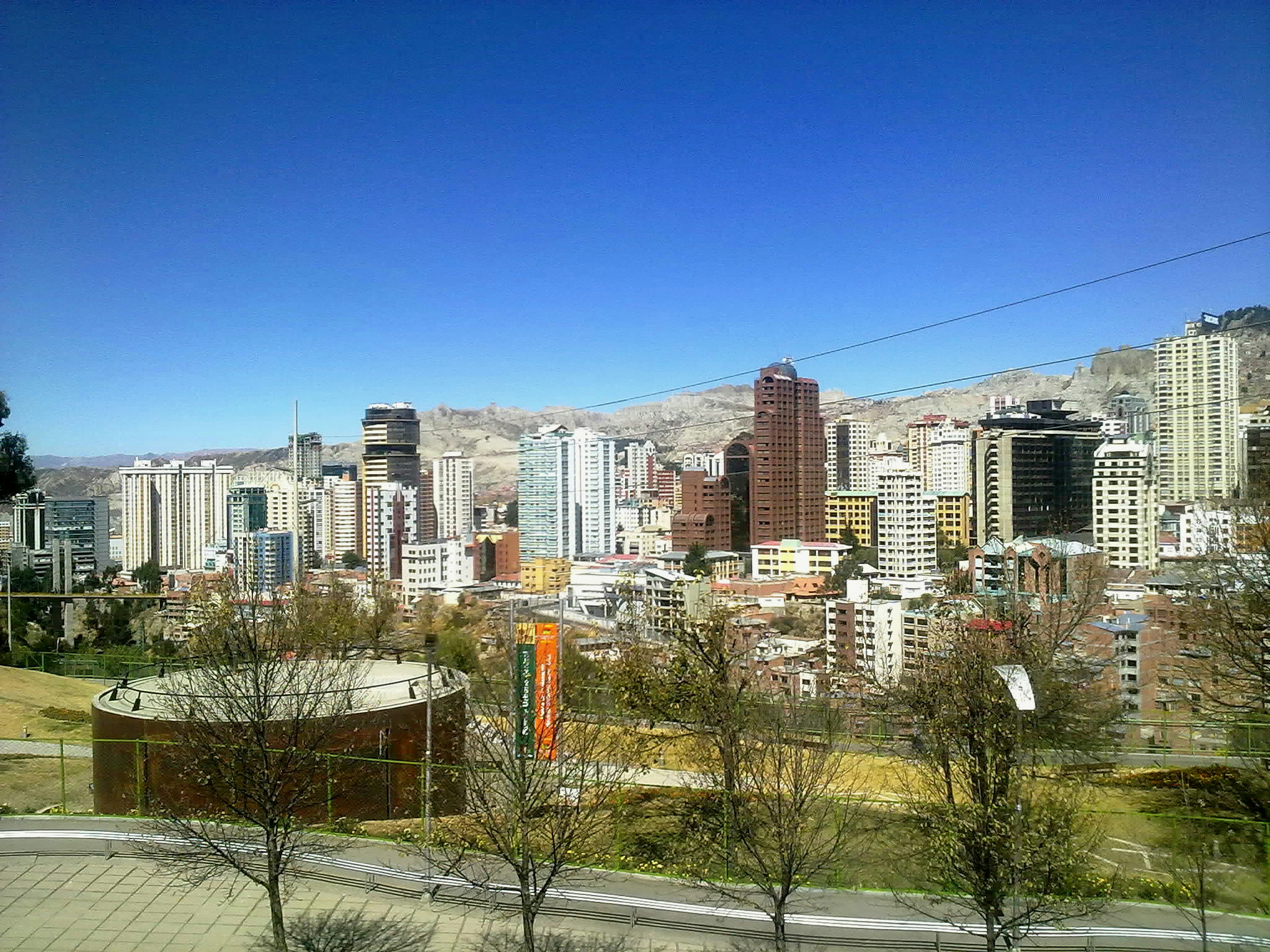 La Paz, vista Parque Urbano